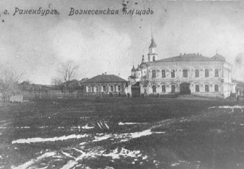 Чаплыгин. Вознесенская площадь.